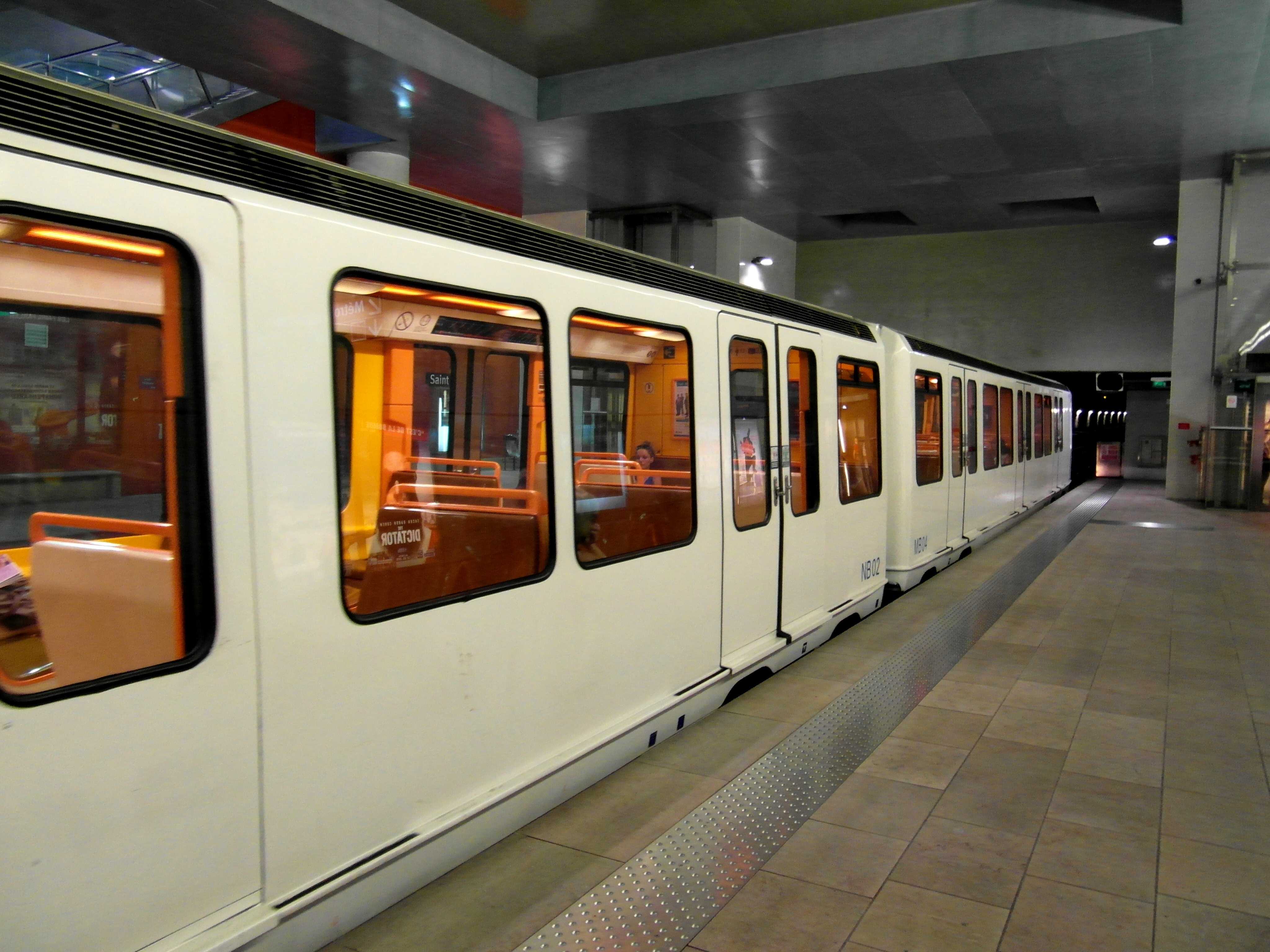 Marseille - Métro - Saint-Barnabé